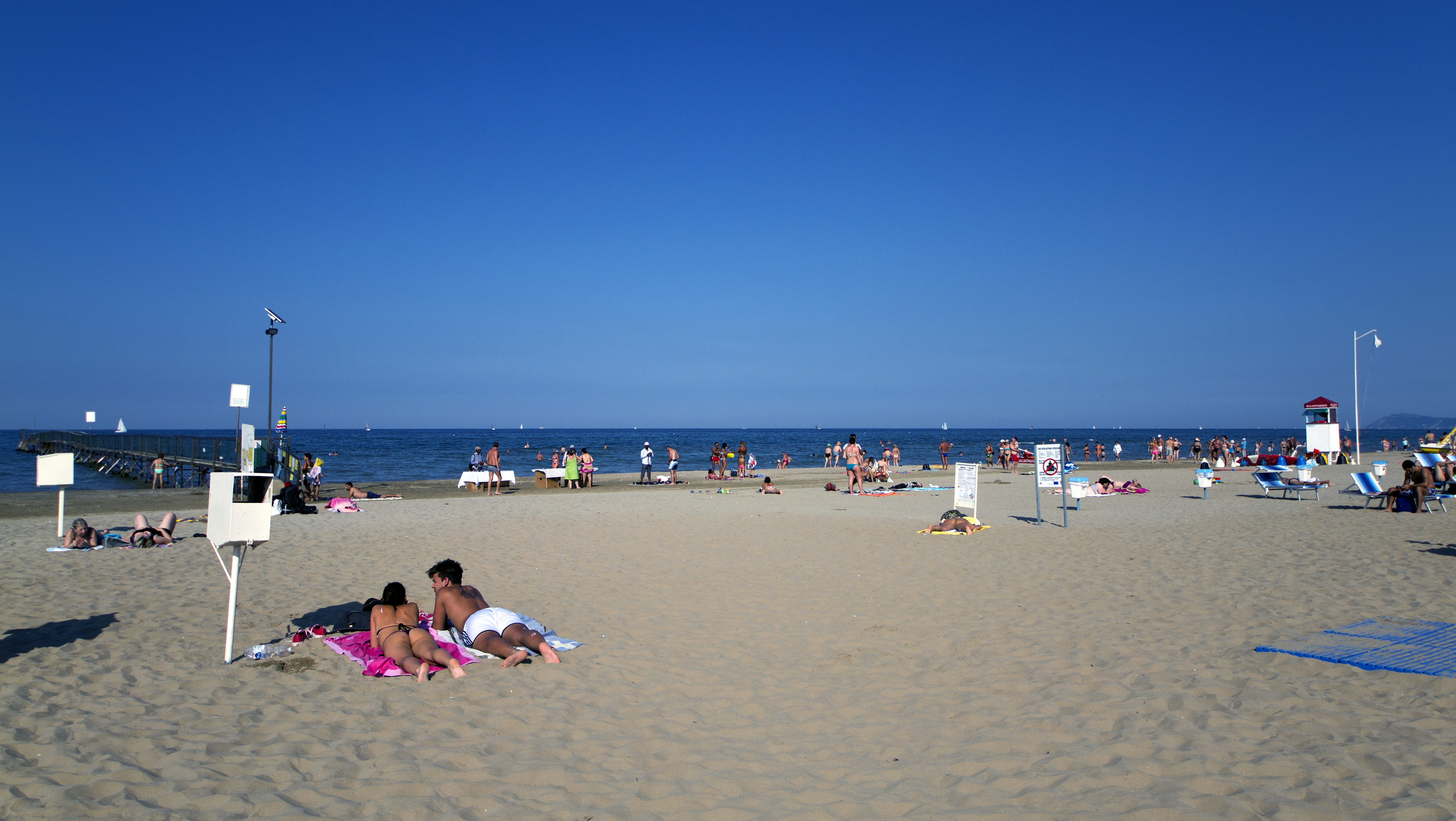 Miramare, 47924 Rimini RN, Italy